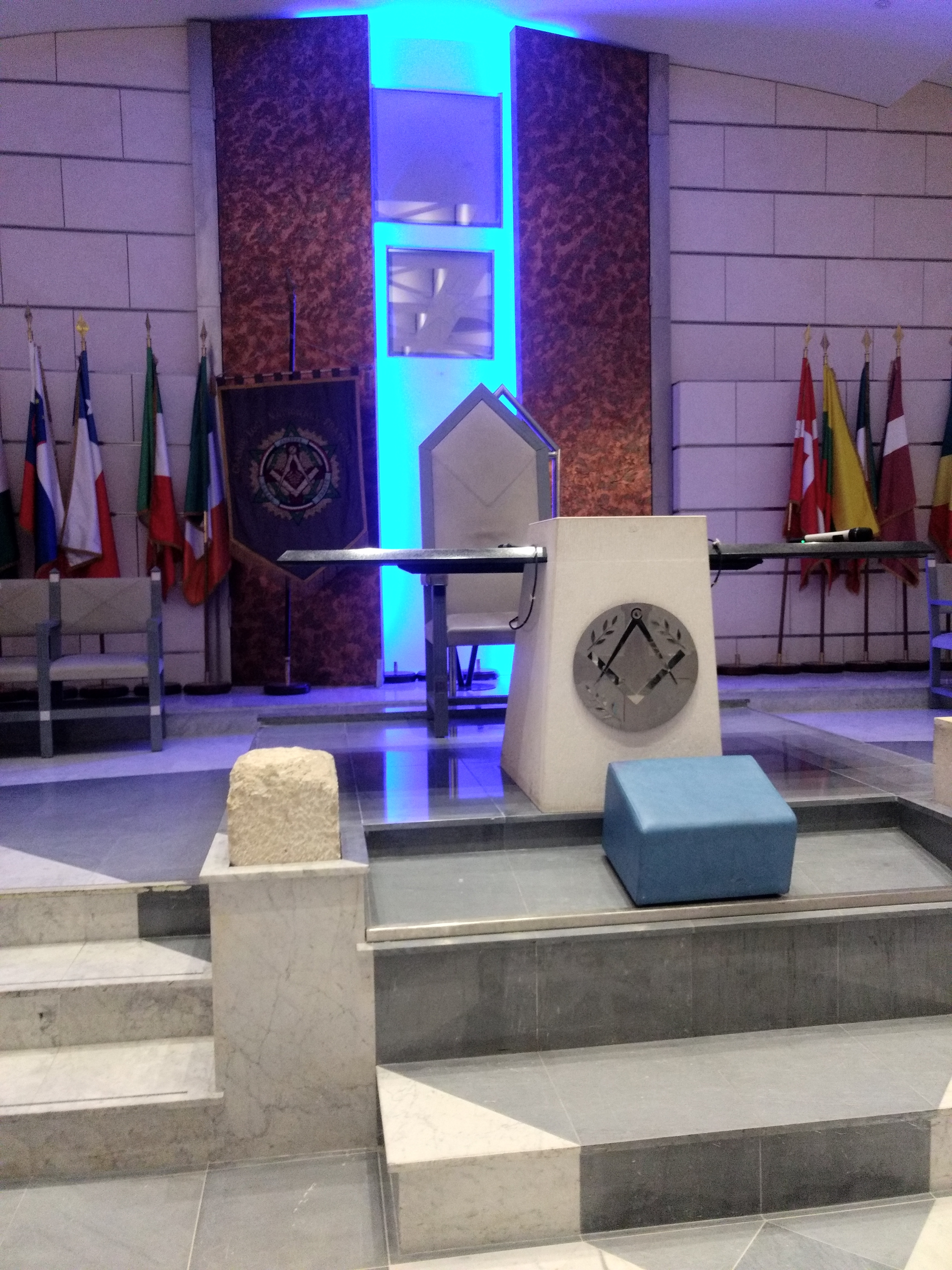 Pupitre à l'une des extrêmités de la grande salle au sous-sol du temple de la Grande Loge Nationale Française situé 12 rue Christine de Pisan Paris 17ème